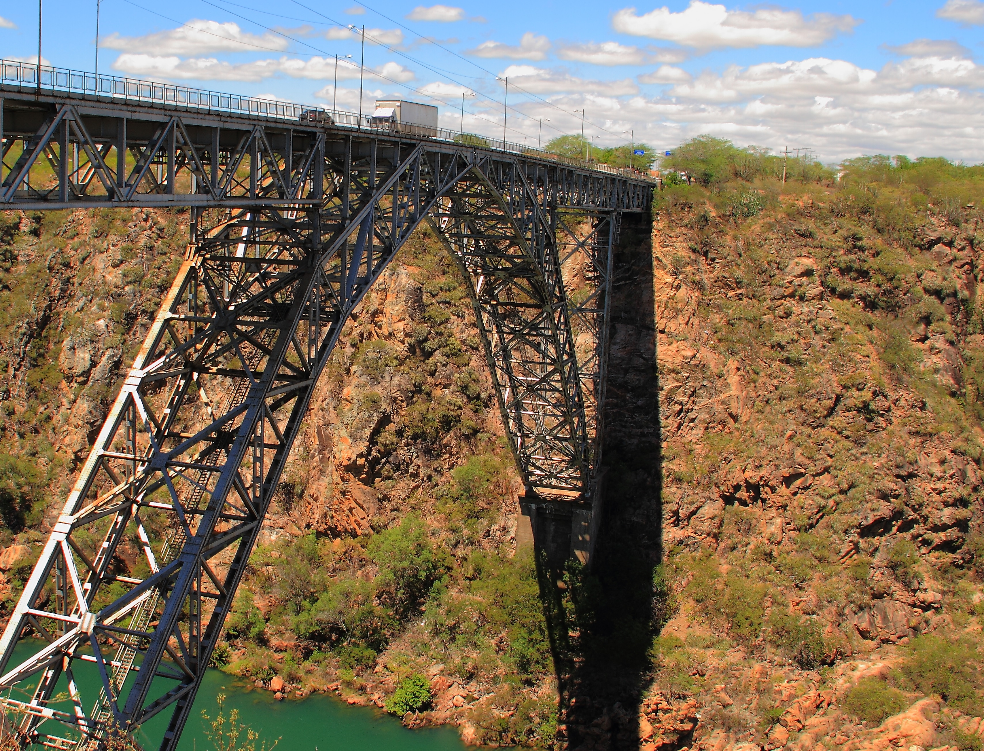 Ponte sob o rio São Francisco na divisa de Alagoas com a Bahia